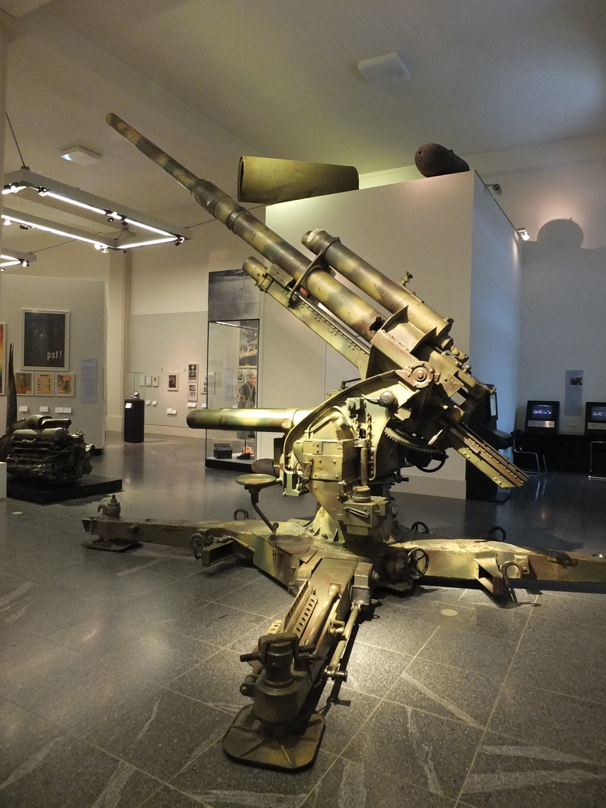 Flugabwehrkanone 8,8 cm, Modell 37, Duitsland, 1937, in het Deutsches Historisches Museum.